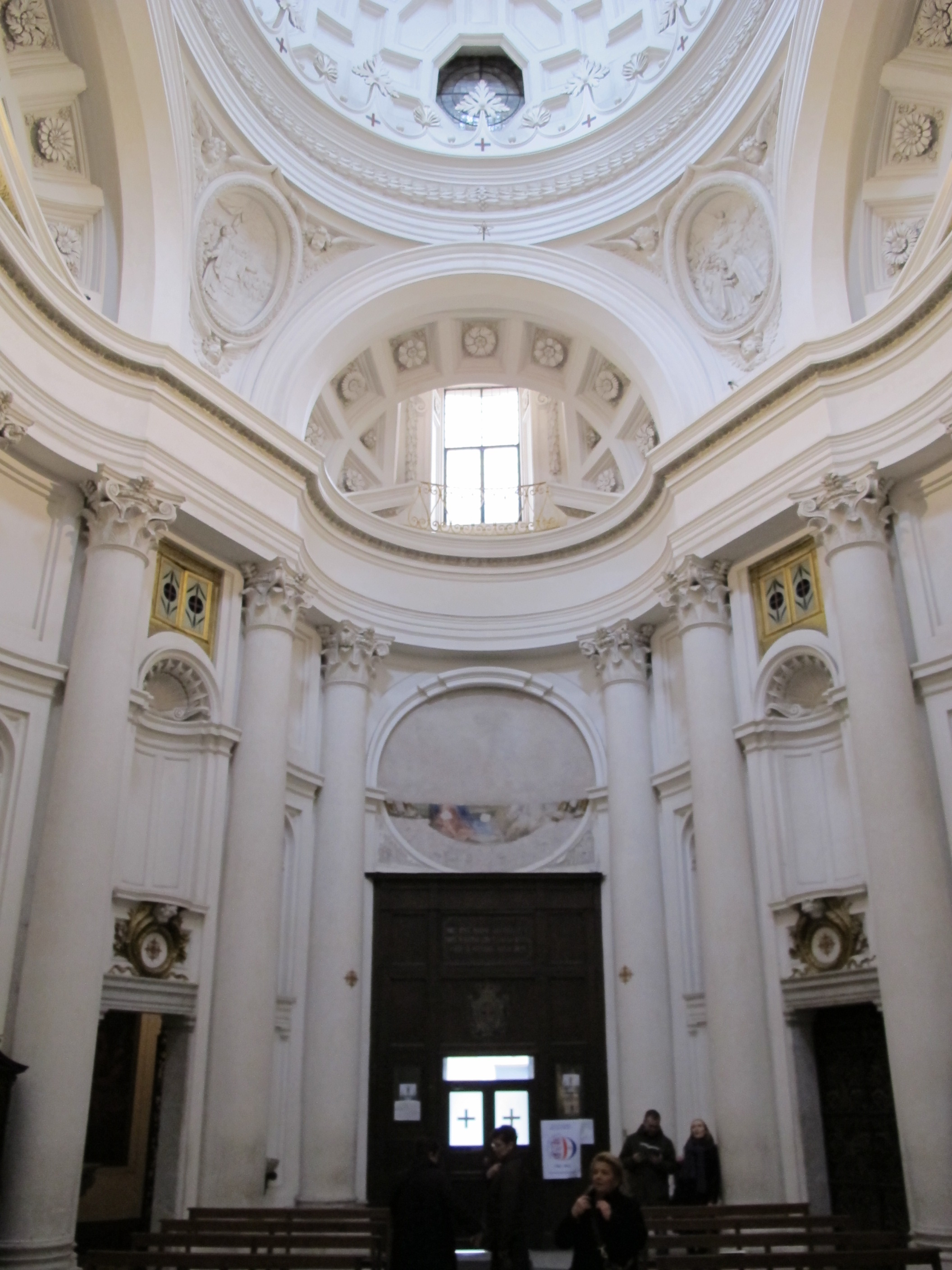 San carlino alle quattro fontane, interno